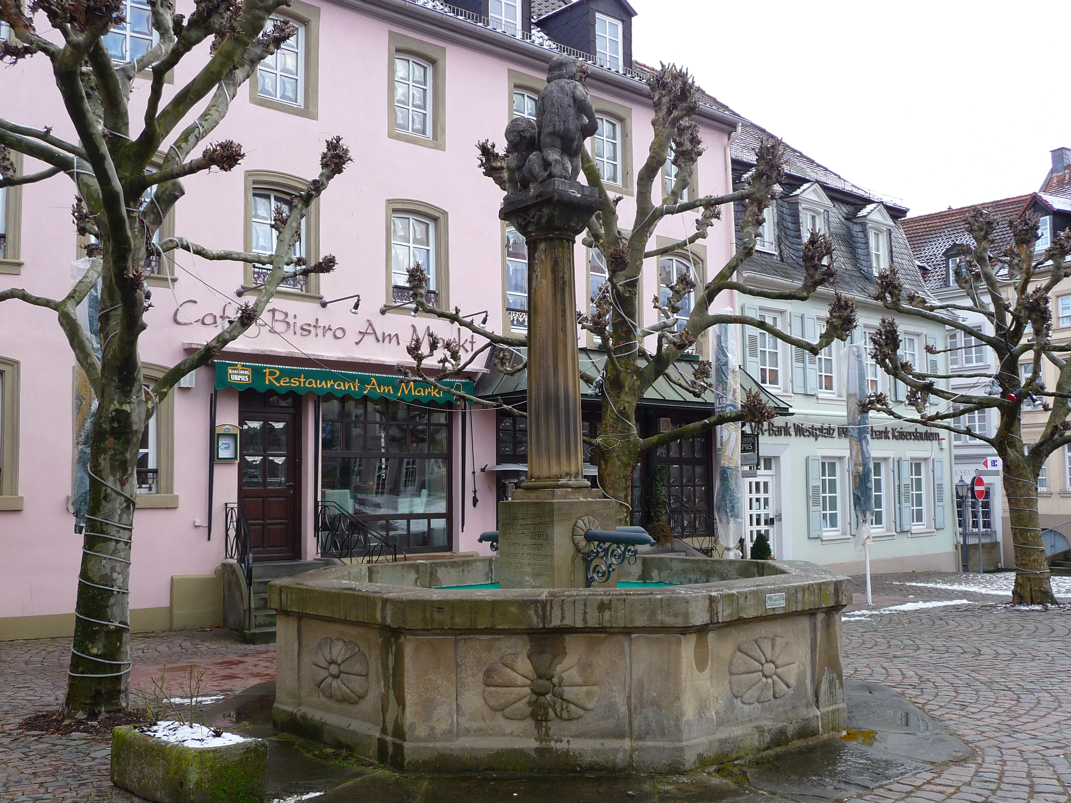 Marktbrunnen (Hutmacherbrunnen) in Kusel (Landkreis Kusel, Deutschland)